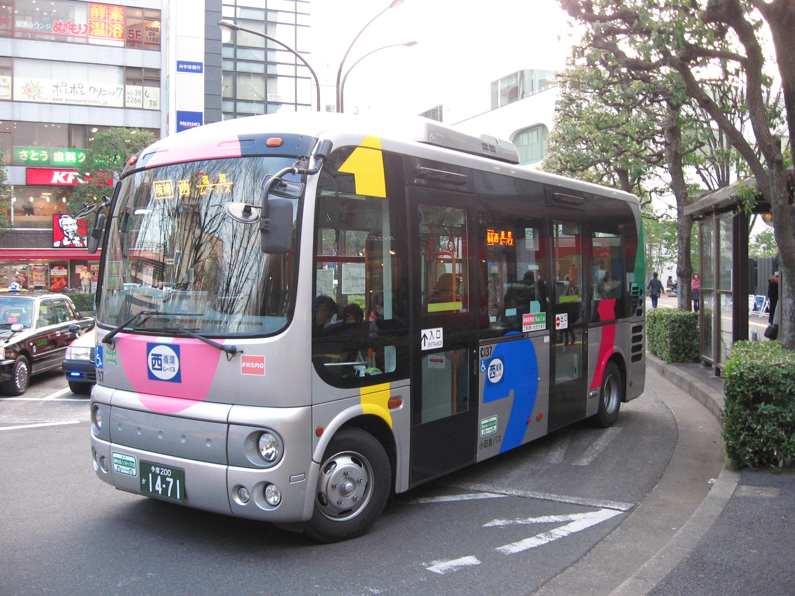 武蔵野市のコミュニティバス「ムーバス」西循環。2013年1月13日、武蔵境駅前にて撮影。